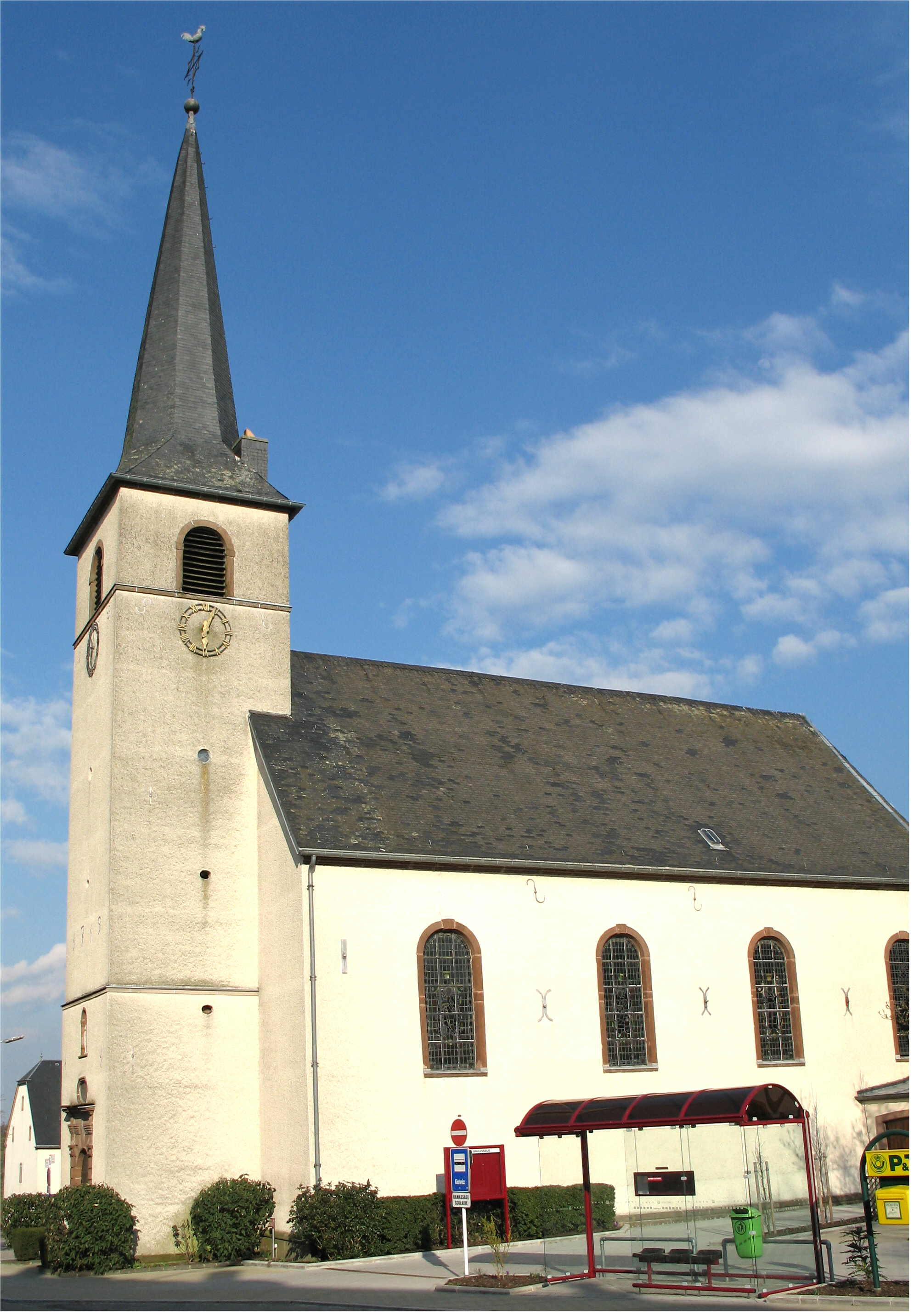 Sujet : Kierch vu Groussbus Source : Eege Foto Johnny Chicago (Abrëll 2006) Lizenz : Bild-GFDL